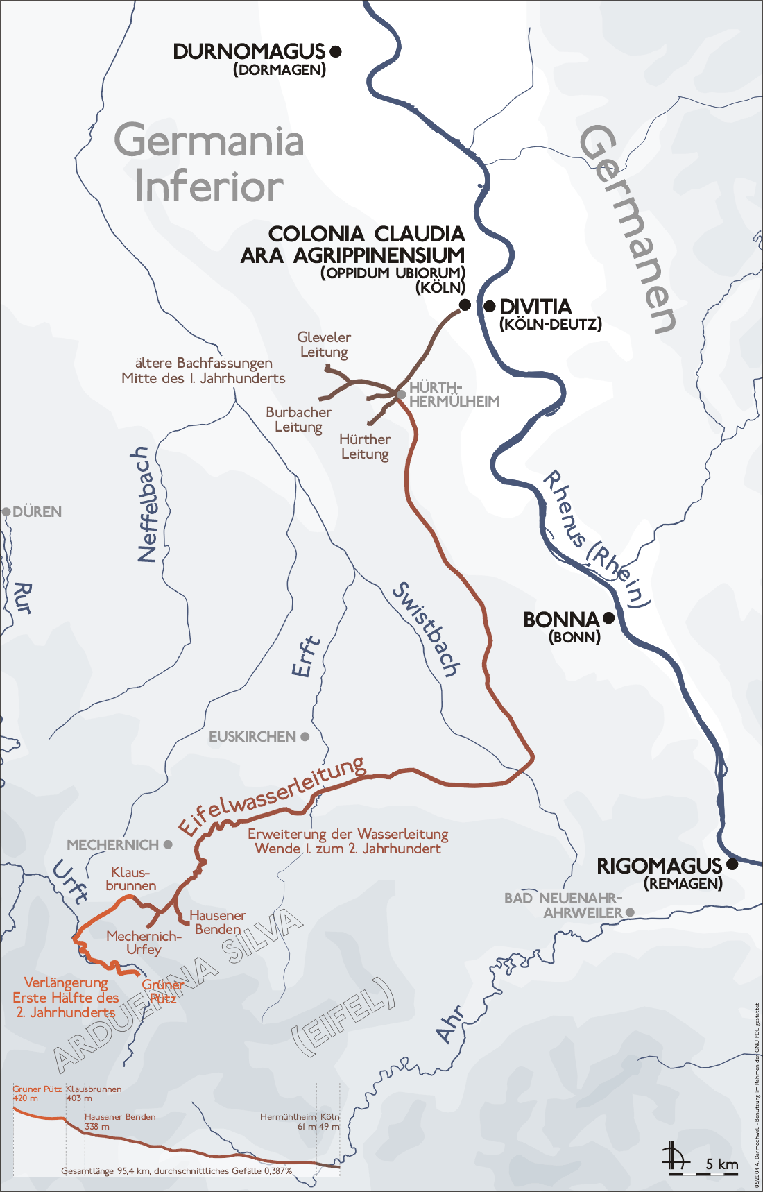 Map Eifelwasserleitung (Eifel aqueduct, Germany)